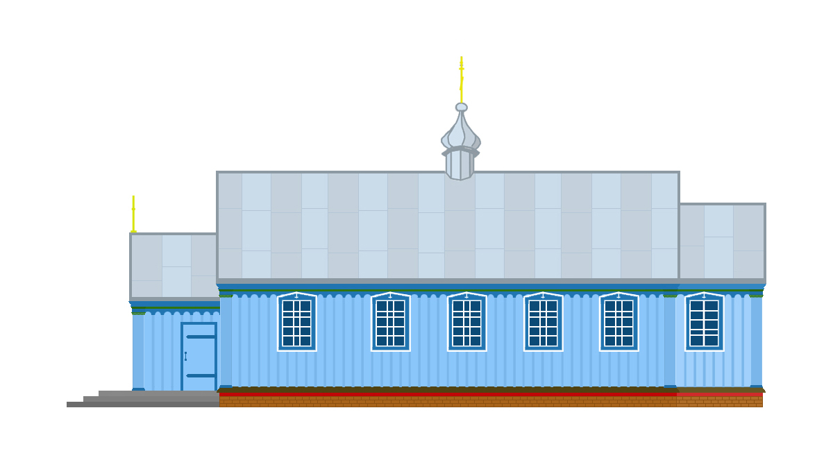 Пд сторона храму